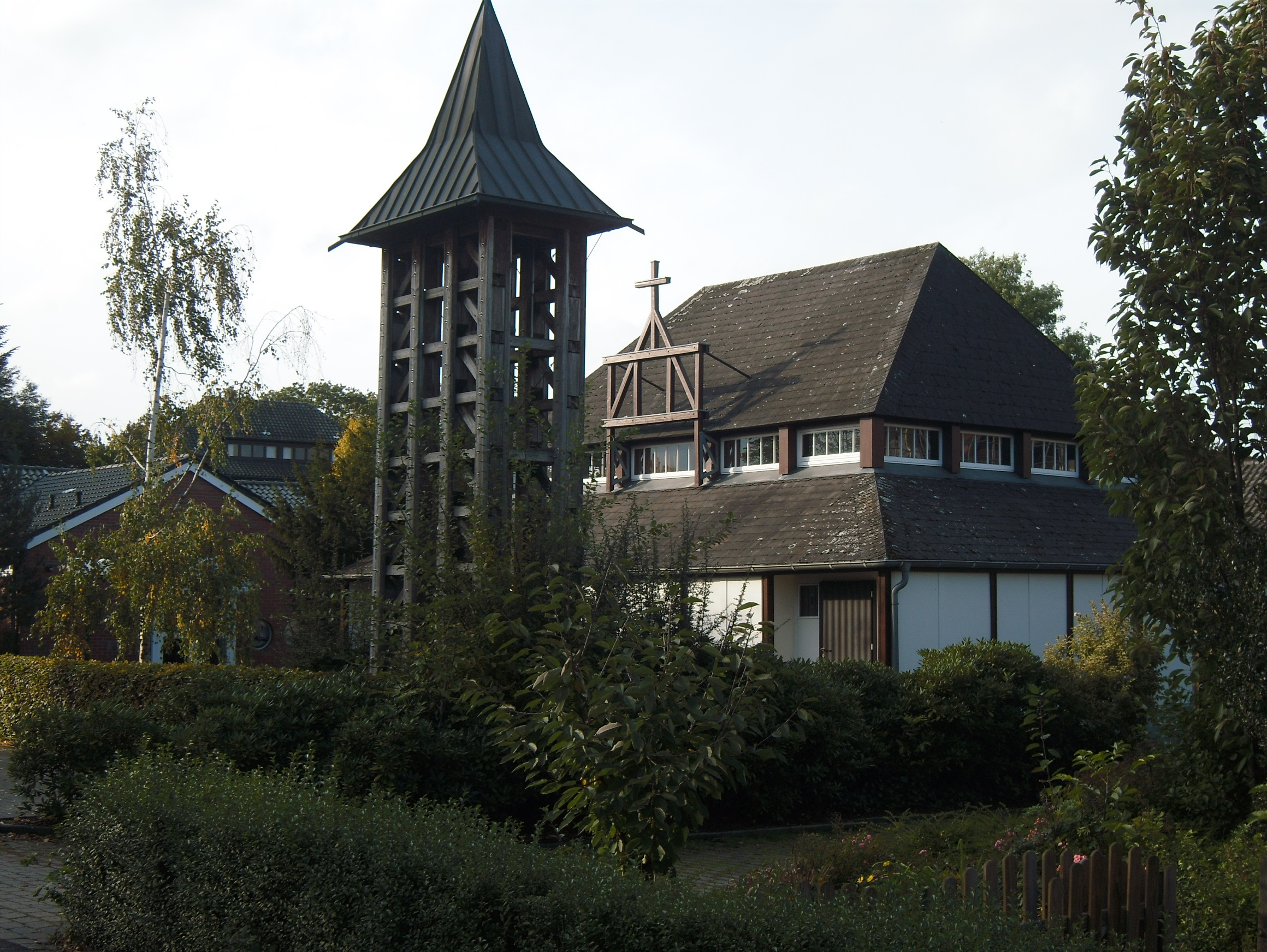 Evangelisch-lutherische Kirch in Neuenhaus. Nach Plänen von Otto Bartning 1950 als Gemeindezentrum (Notkirche Typ D) gebaut.